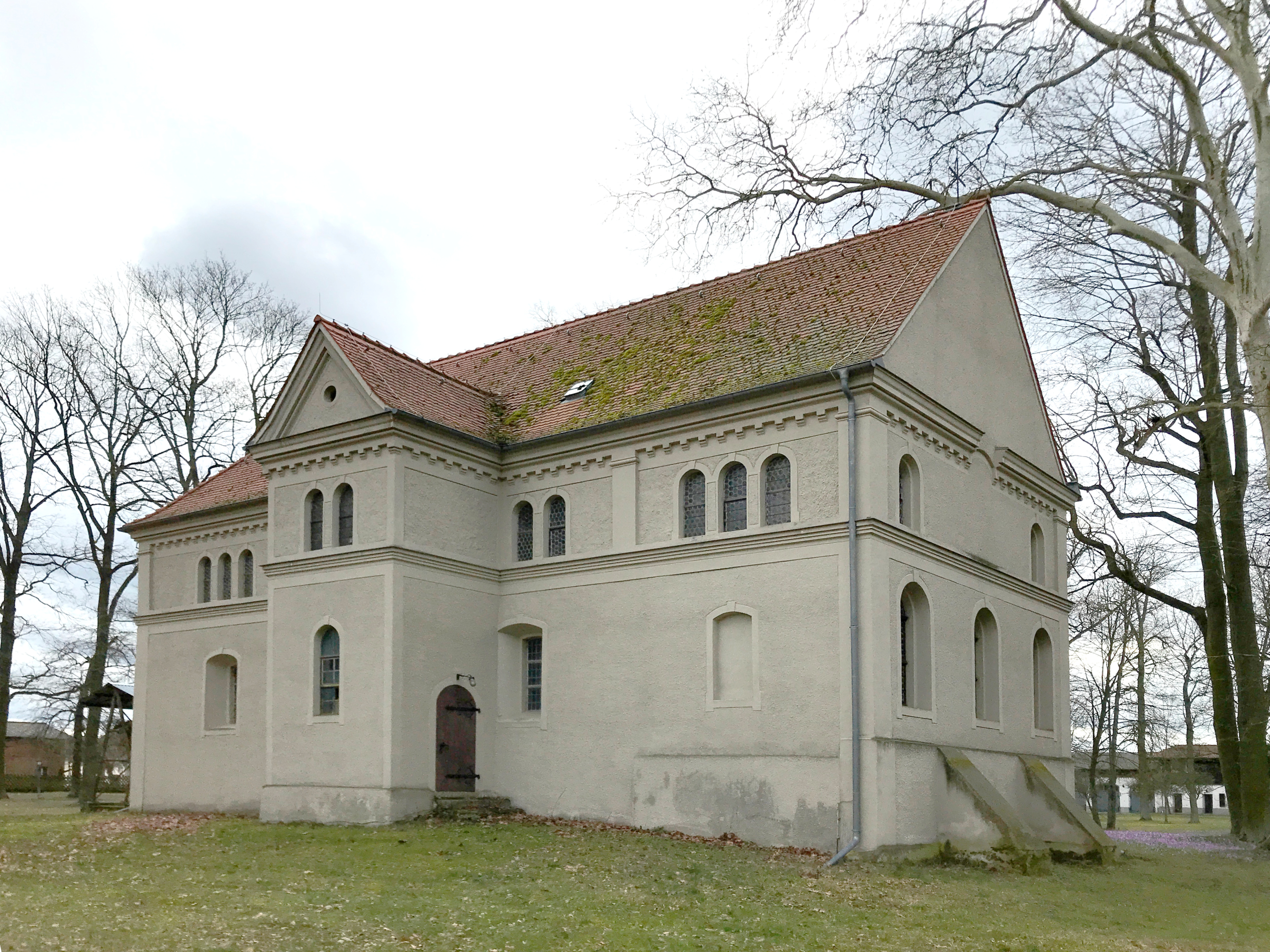 Die Dorfkirche Wiepersdorf geht in ihrem Kern auf einen mittelalterlichen Feldsteinbau zurück und ist Bestandteil des Schlosses Wiepersdorf